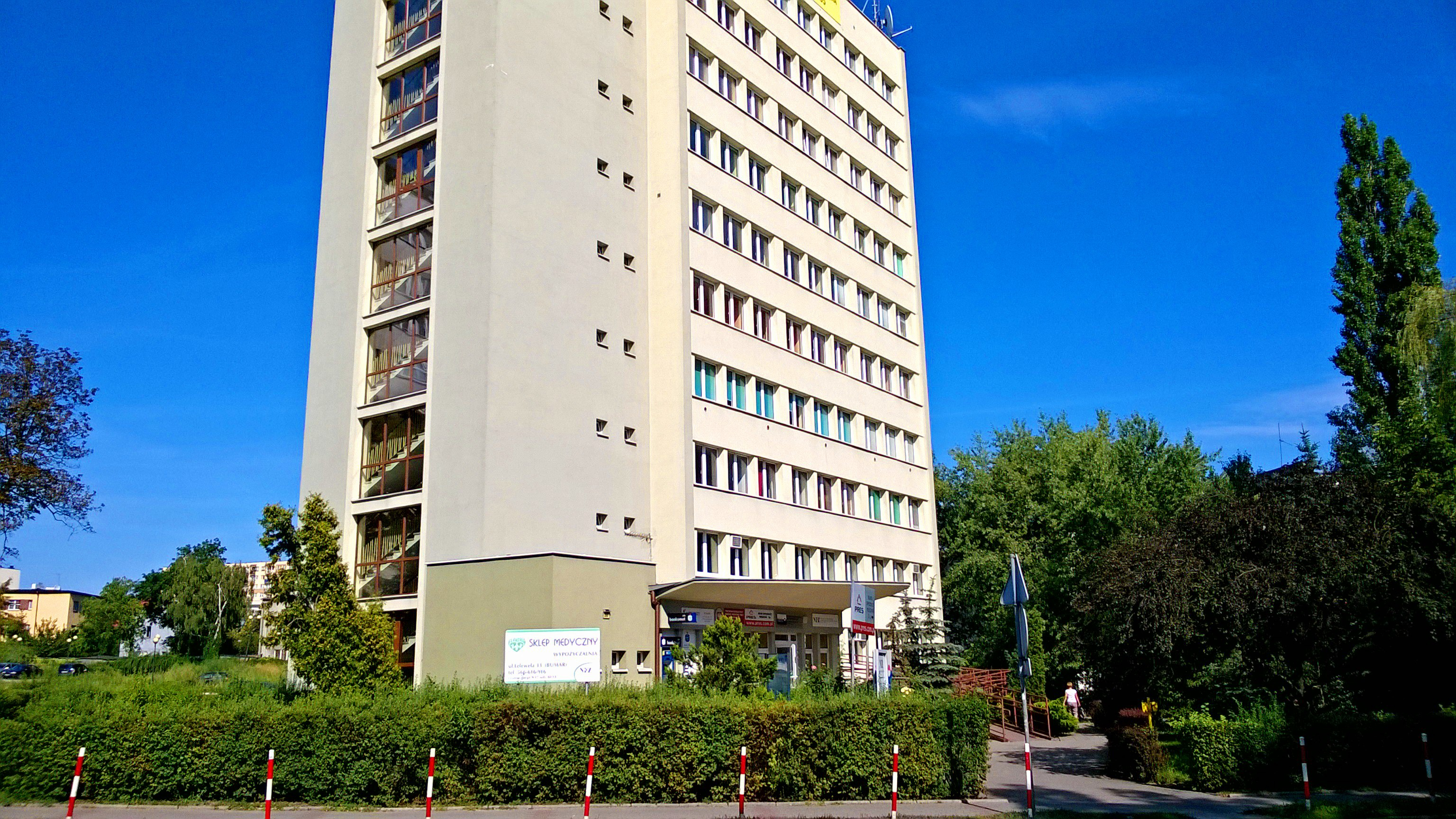 NFZ Toruń2